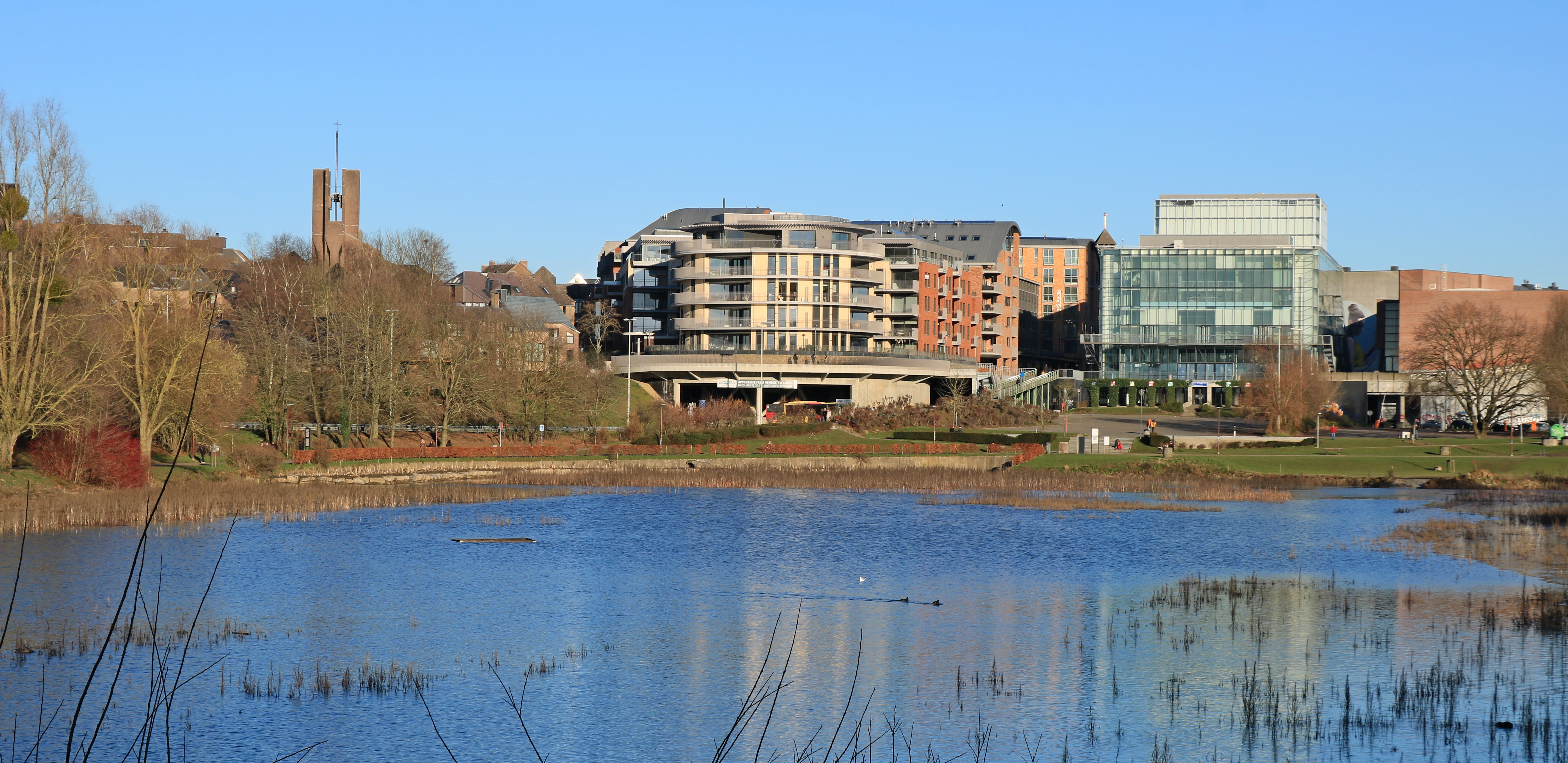 Belgique - Brabant wallon - Ottignies-Louvain-la-Neuve - Lac de Louvain-la-Neuve (lac artificiel aménagé en 1984) : le lac après l'assec 2019